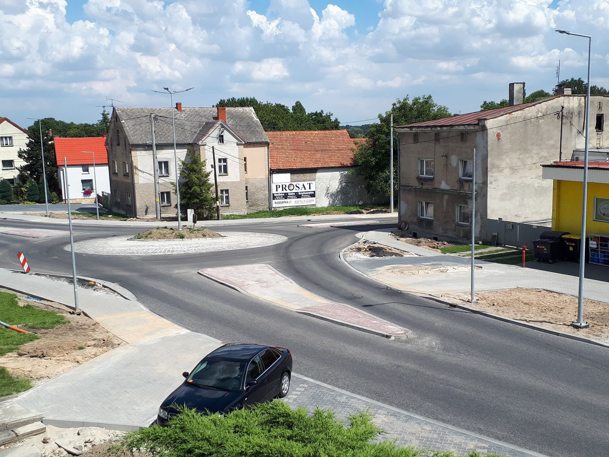 Widok na centrum wsi z kościoła parafialnego.